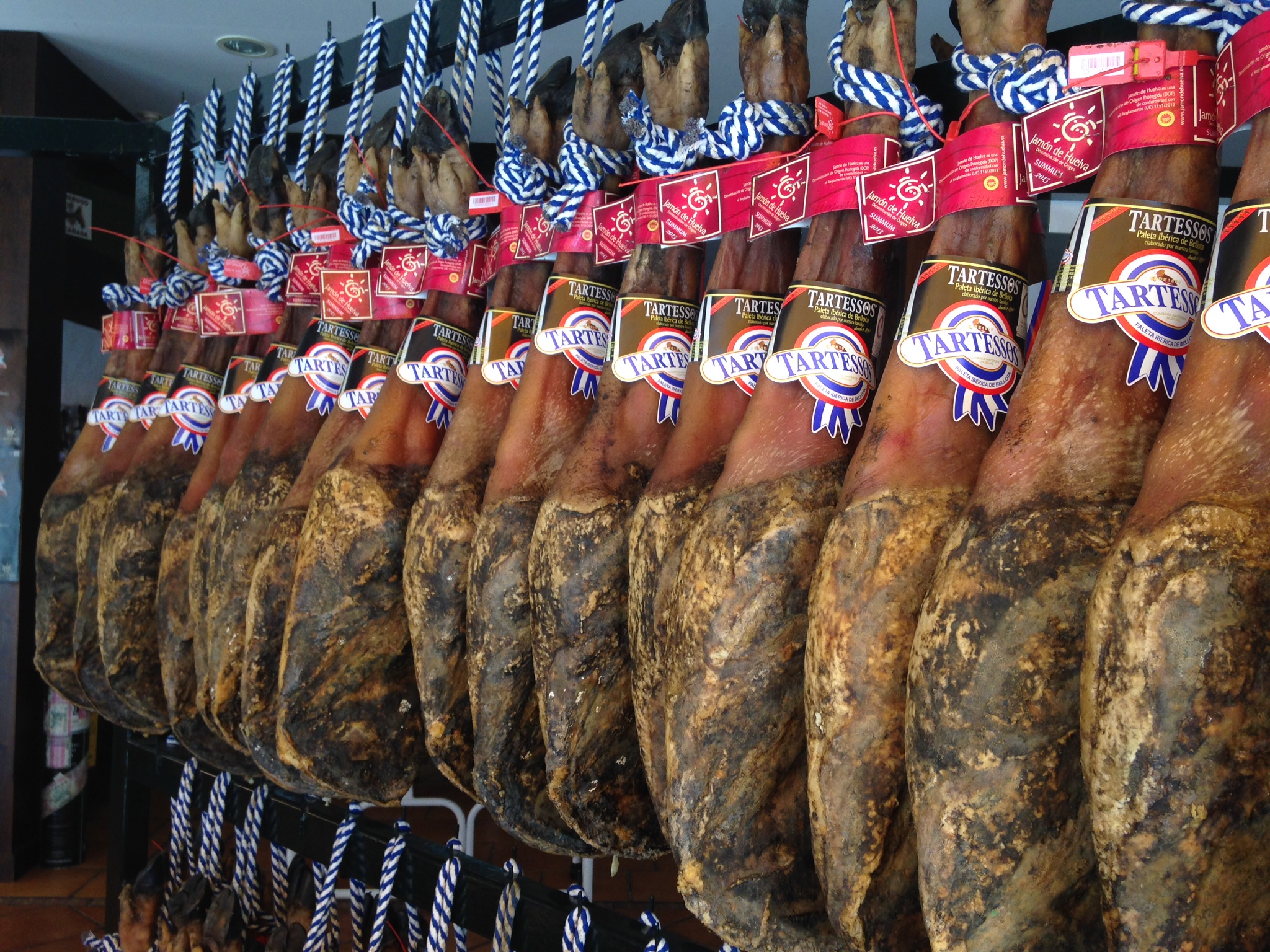 Jamones de Jabugo en Jabugo Huelva Andalucía España